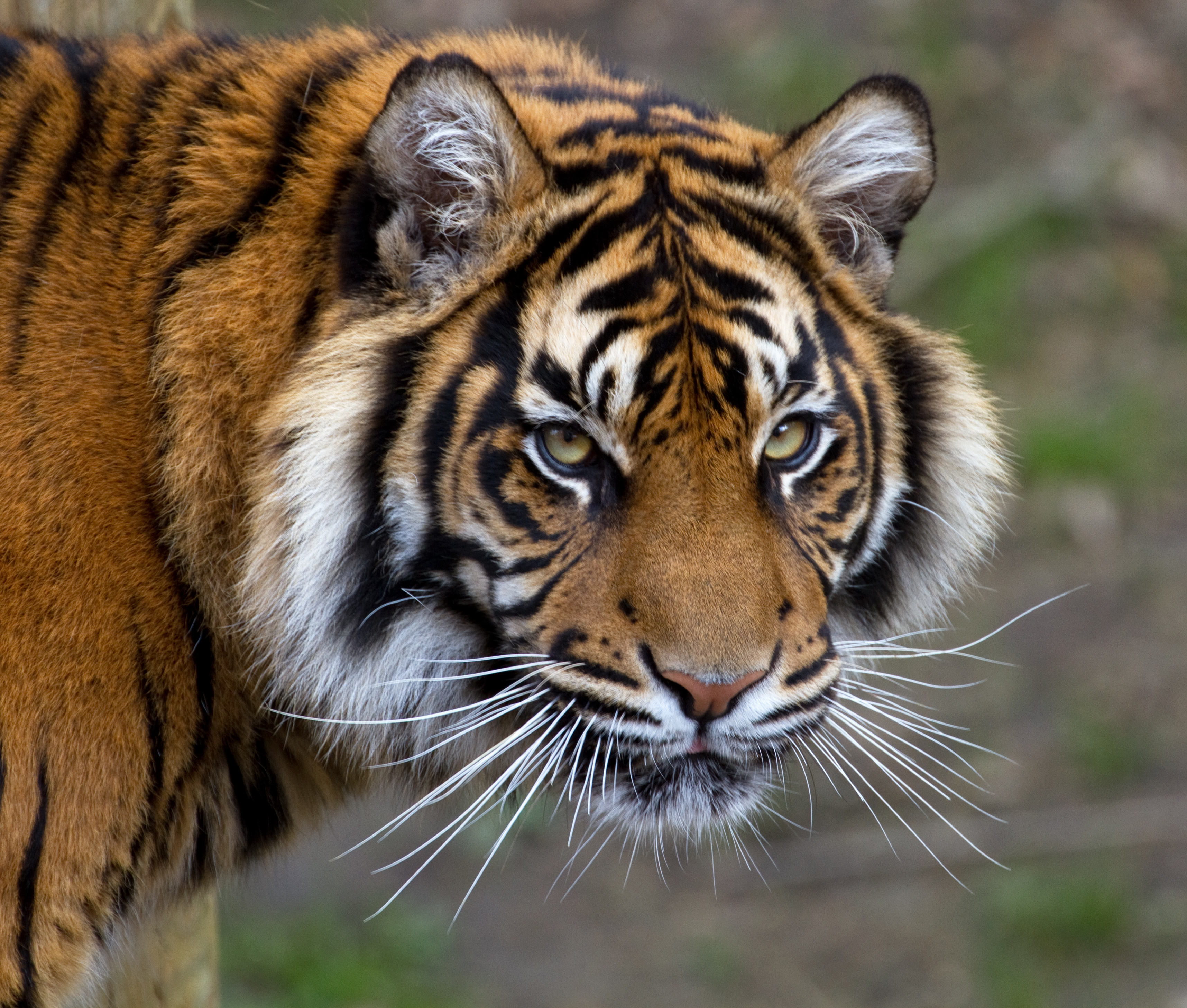 Sumatran Tiger 5